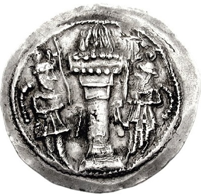 سکه یزدگرد یکم، از نمای پشت، در آن تصویر یزدگرد یکم و بهرام پنجم (برام گور) حک شده است